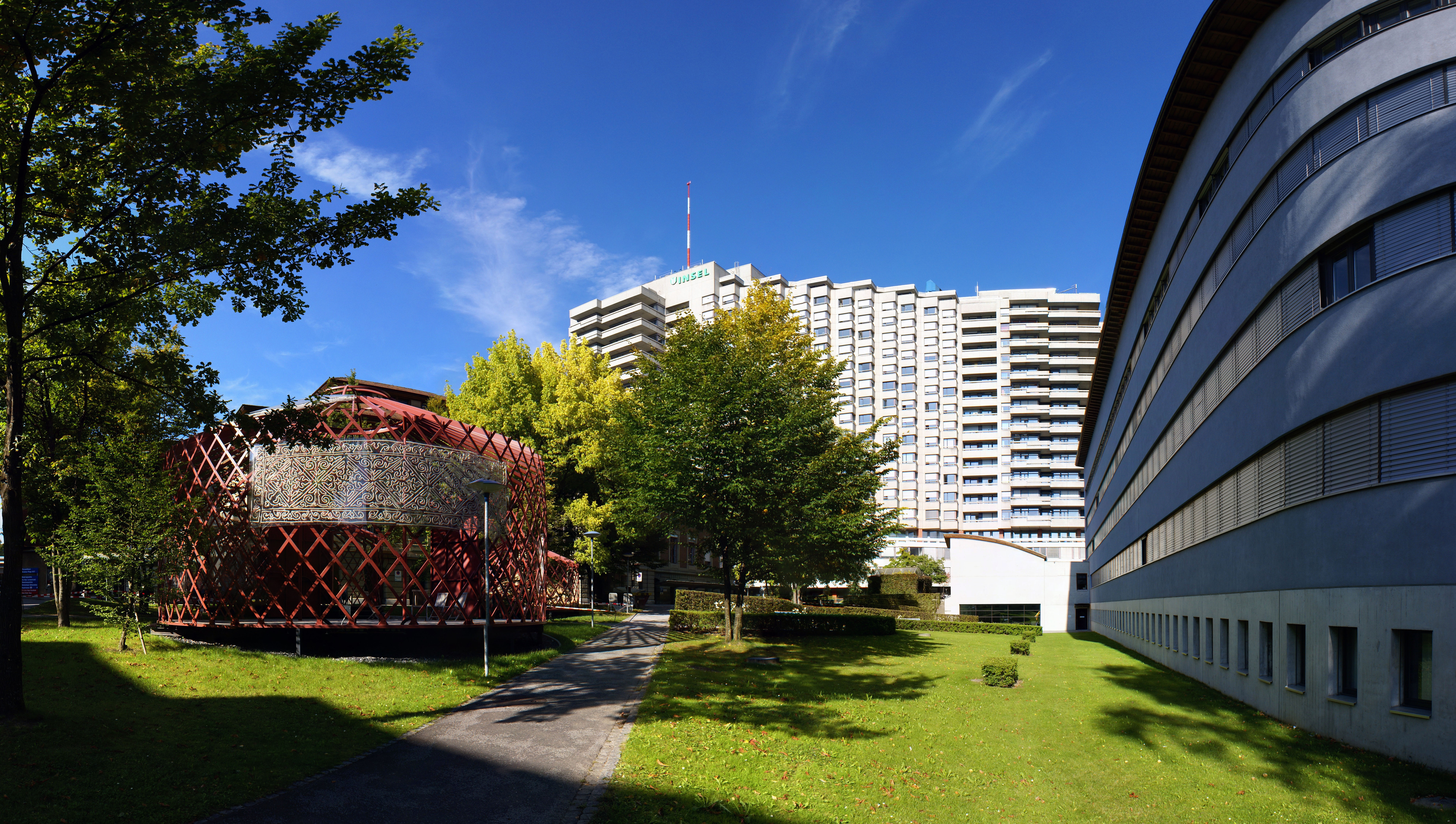 Inselspital, Berne.